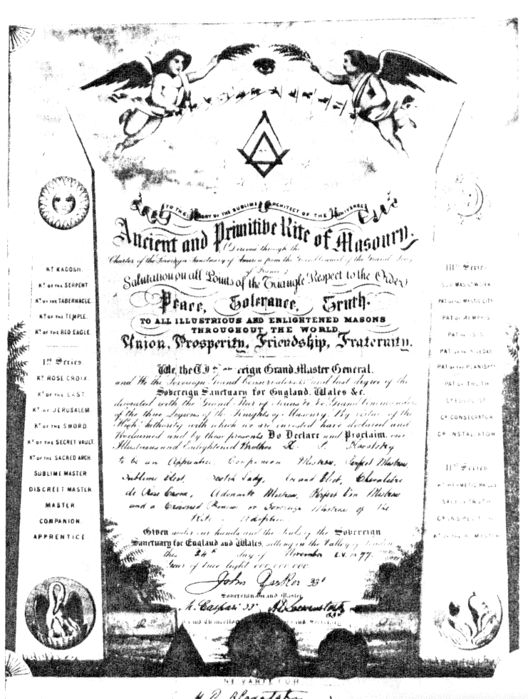 Das Freimaurer-Patent des Memphis-Misraim-Ritus von Helena Petrovna Blavatsky. Über 100 Jahre alt.